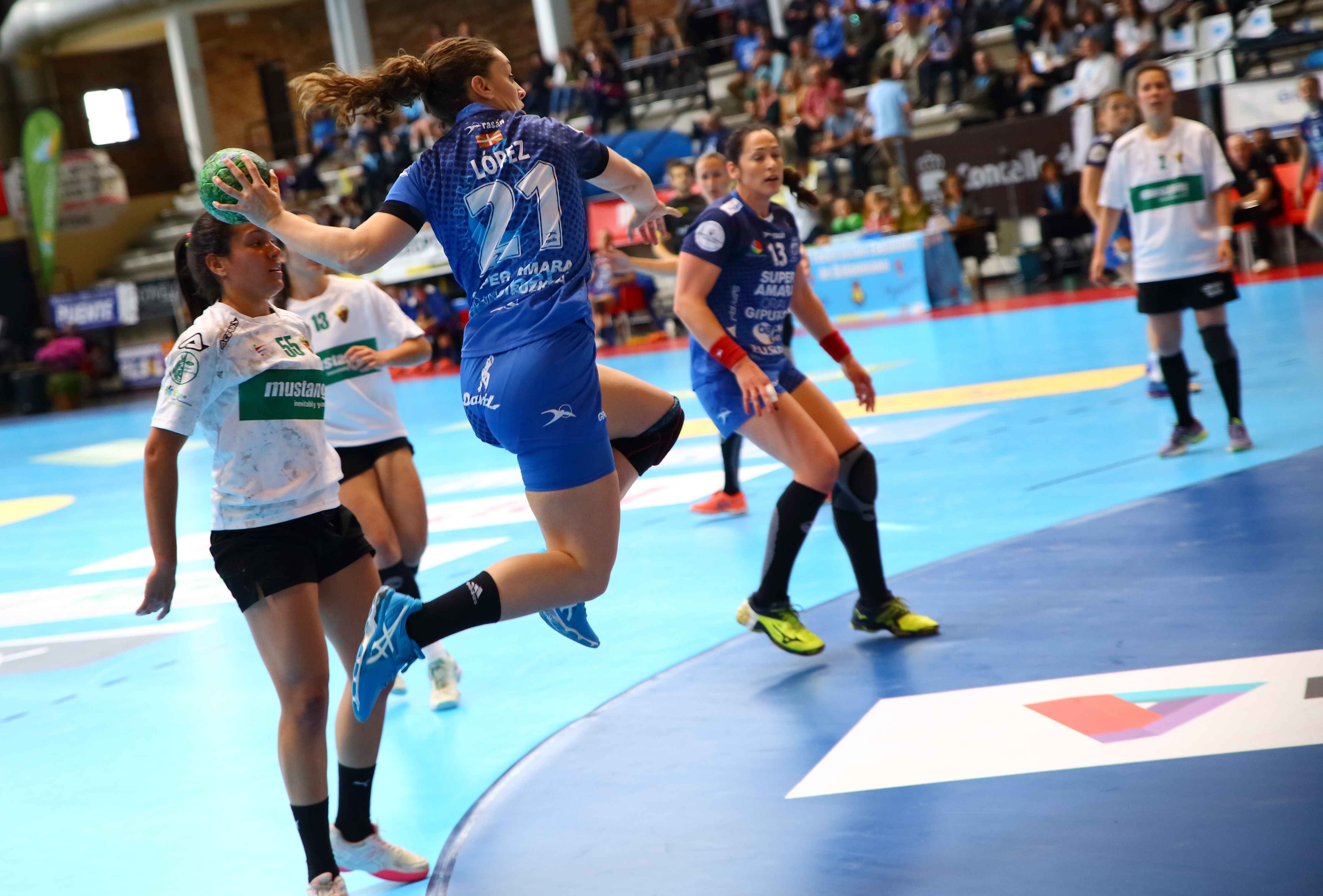 Marta "López", partido correspondiente a cuatros de final.